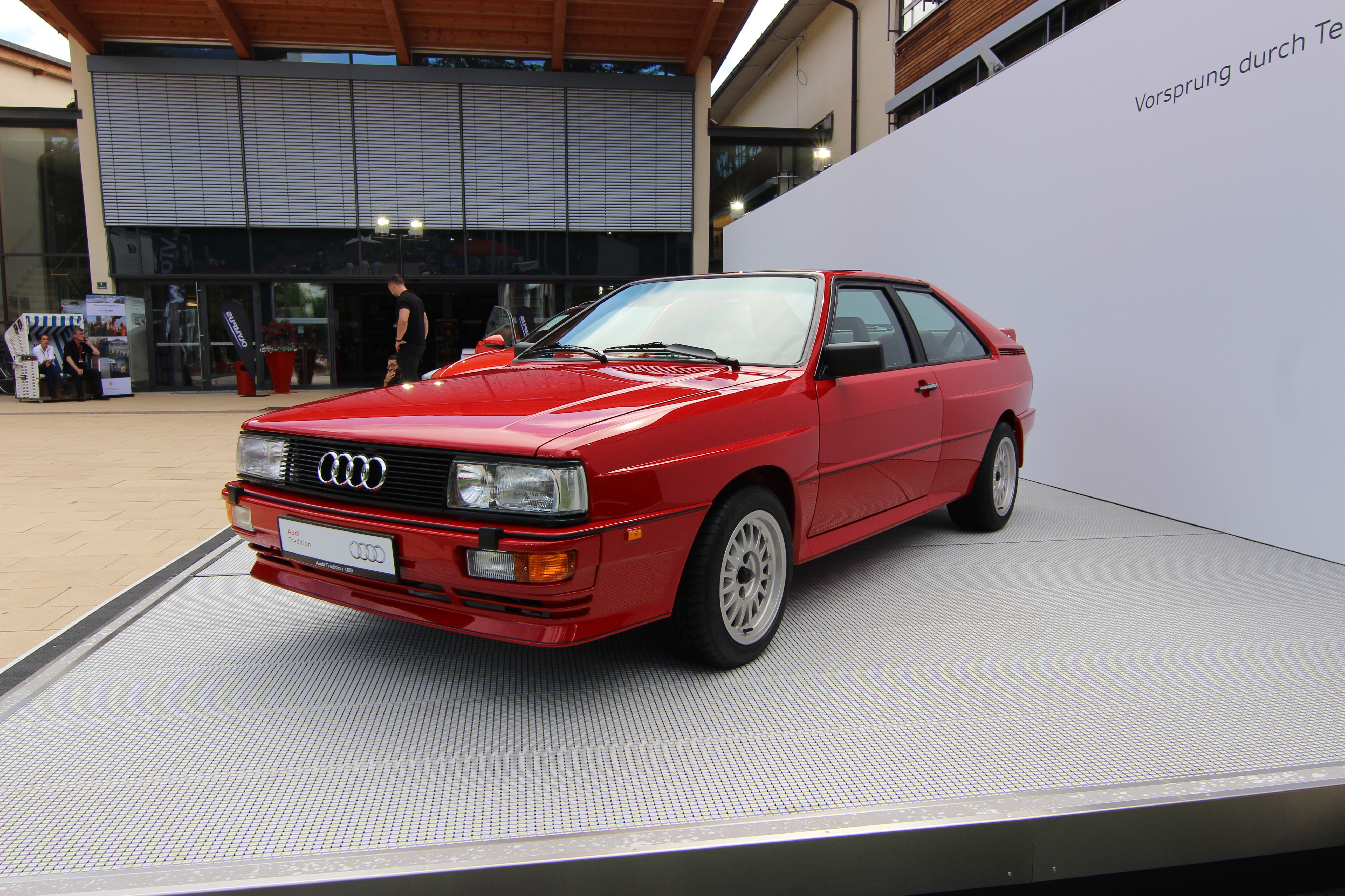 Audi Quattro - auf dem Fotogipfel Oberstdorf